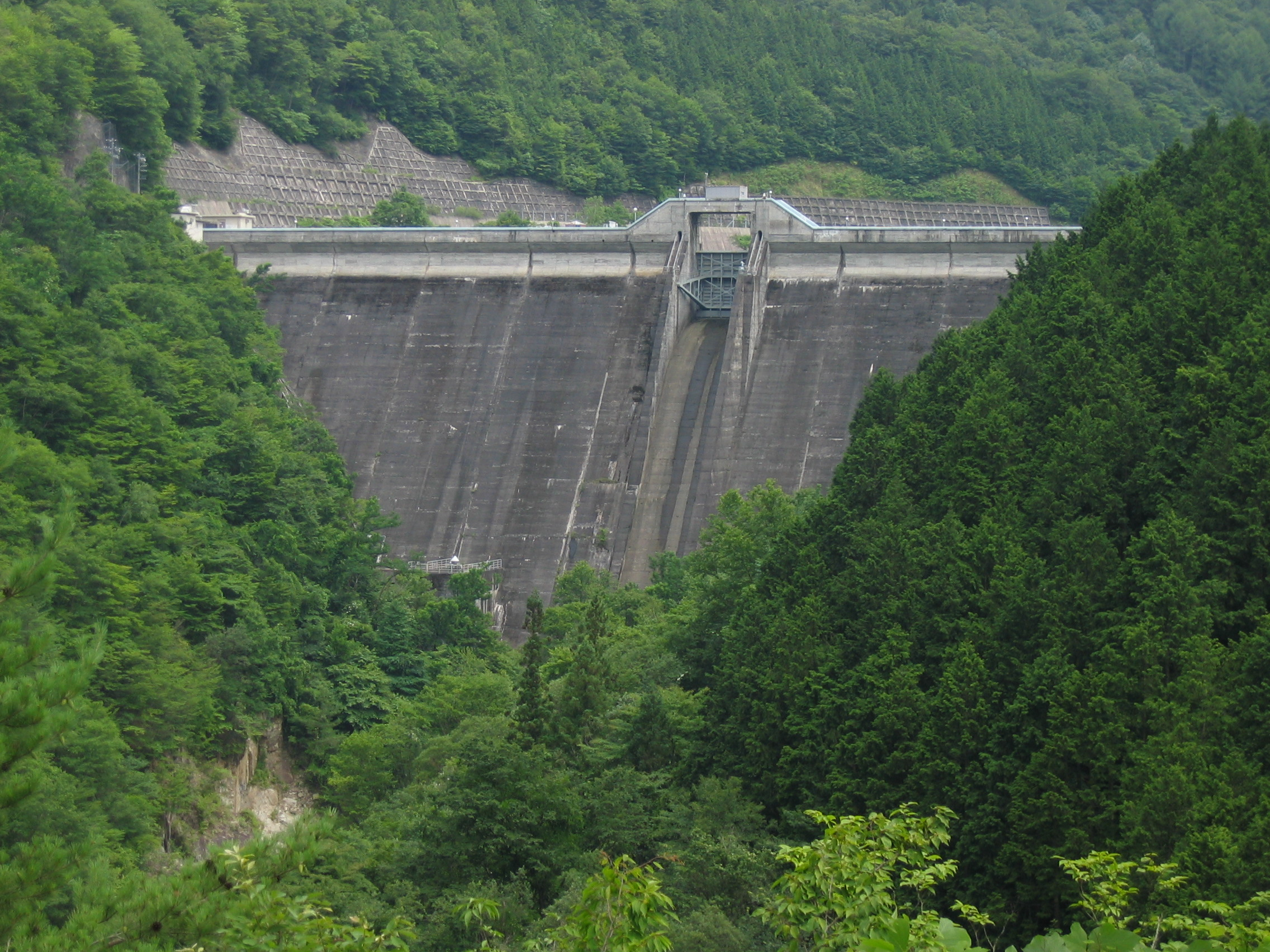 Akigami Dam (秋神ダム) is a dam in Takayama city, Gifu, Japan.